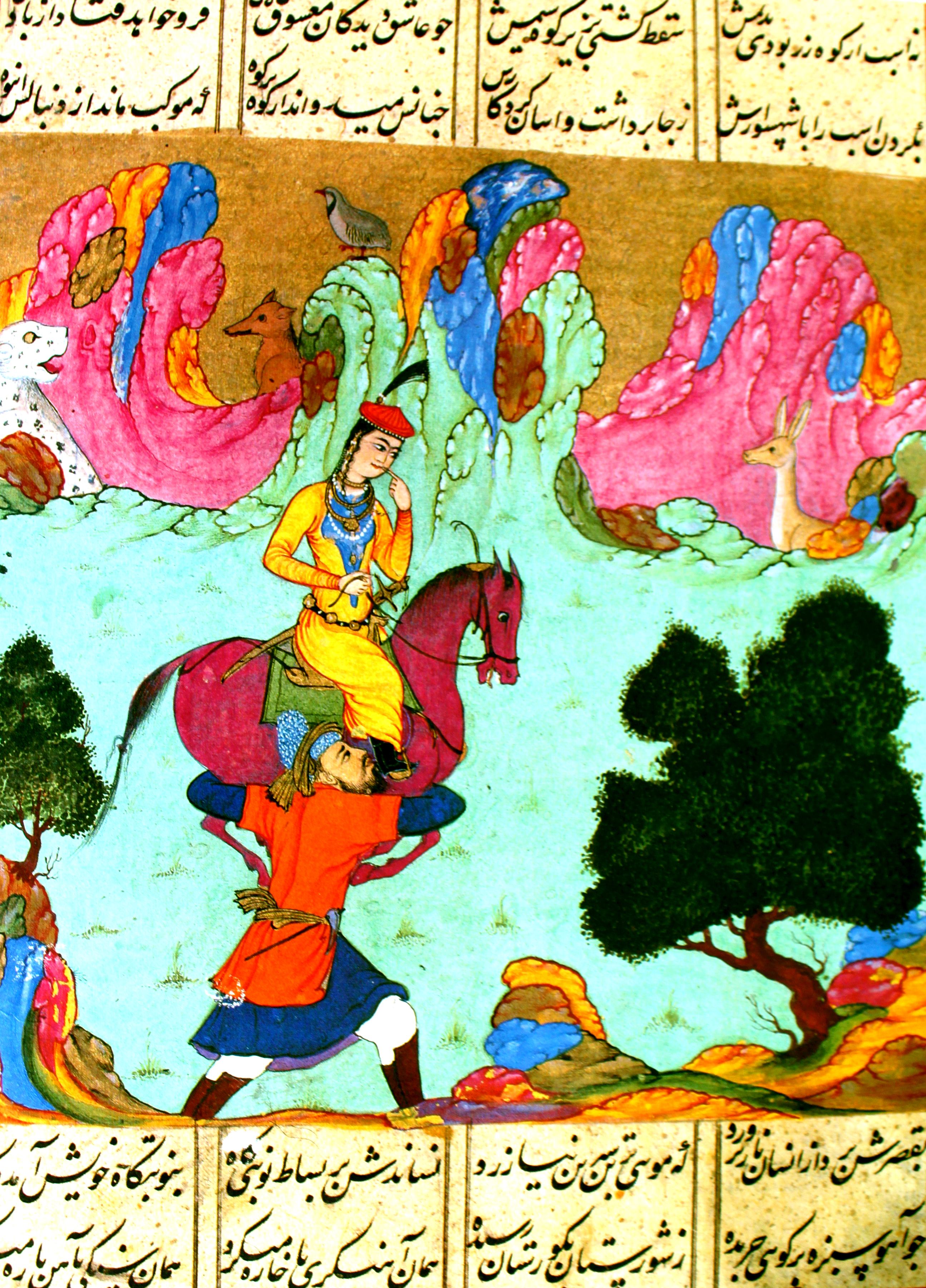 Fərhadın Şirini xilas etməsi, 1648, Buxara